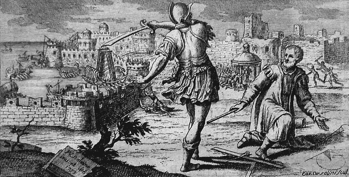 Tratto dal libro Notizie istoriche e critiche intorno alla vita, alle invenzioni, ed agli scritti di Archimede Siracusano